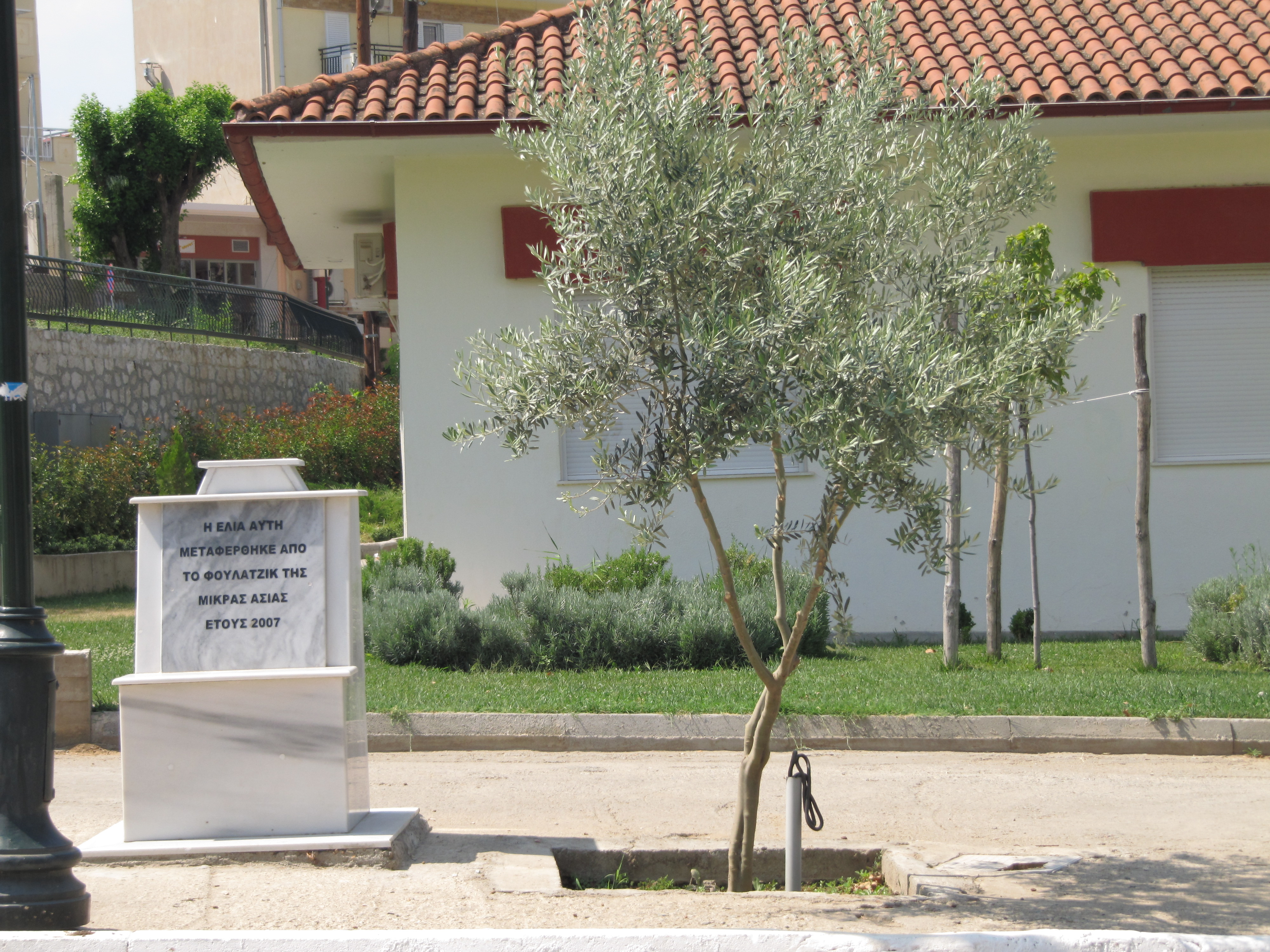 Roots...